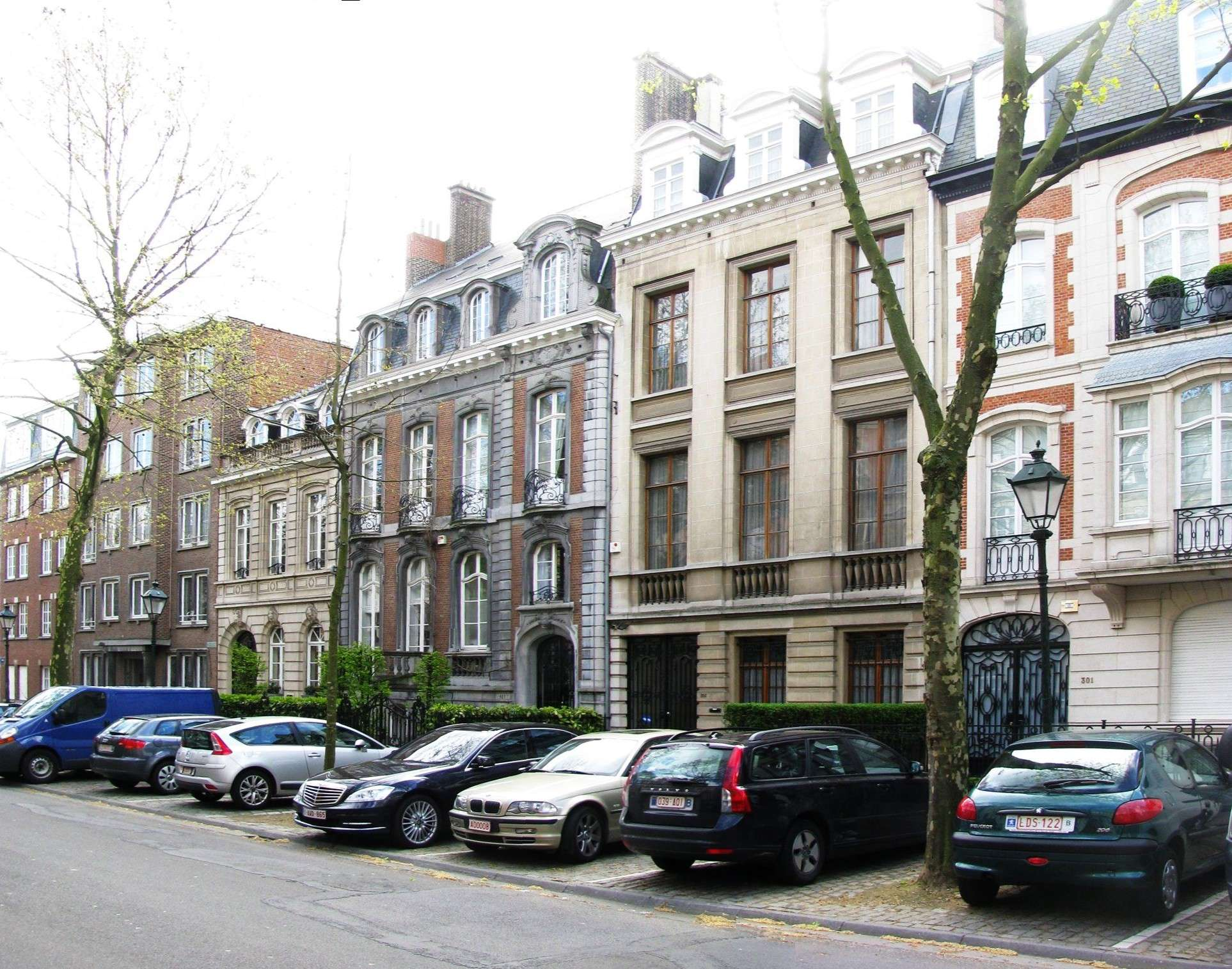 Ixelles, av.Molière Hotels particuliers, le 305 par Alfred Frère en 1912